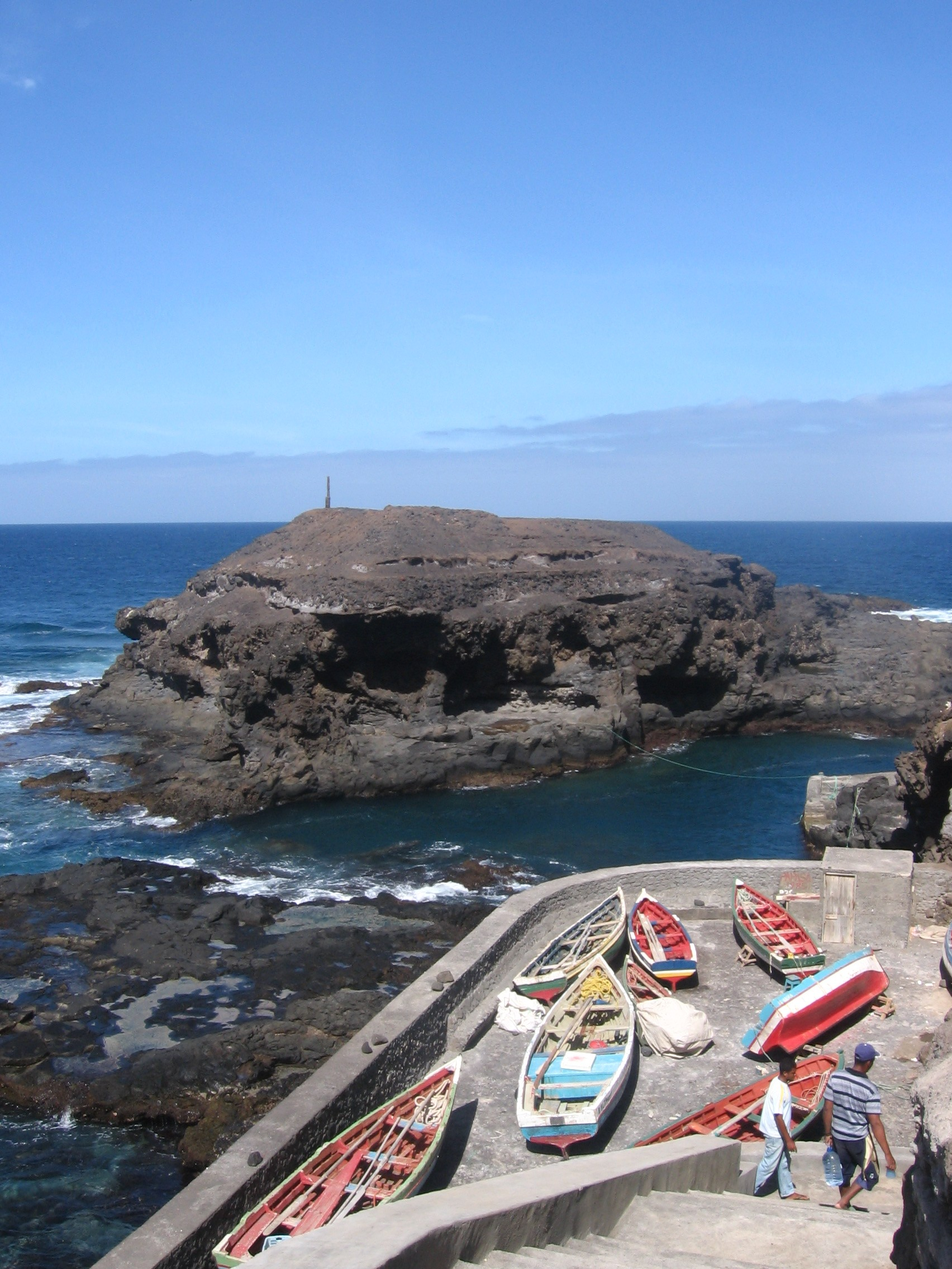 Porto de Cruzinha da Garça, Santo Antão, Cabo Verde